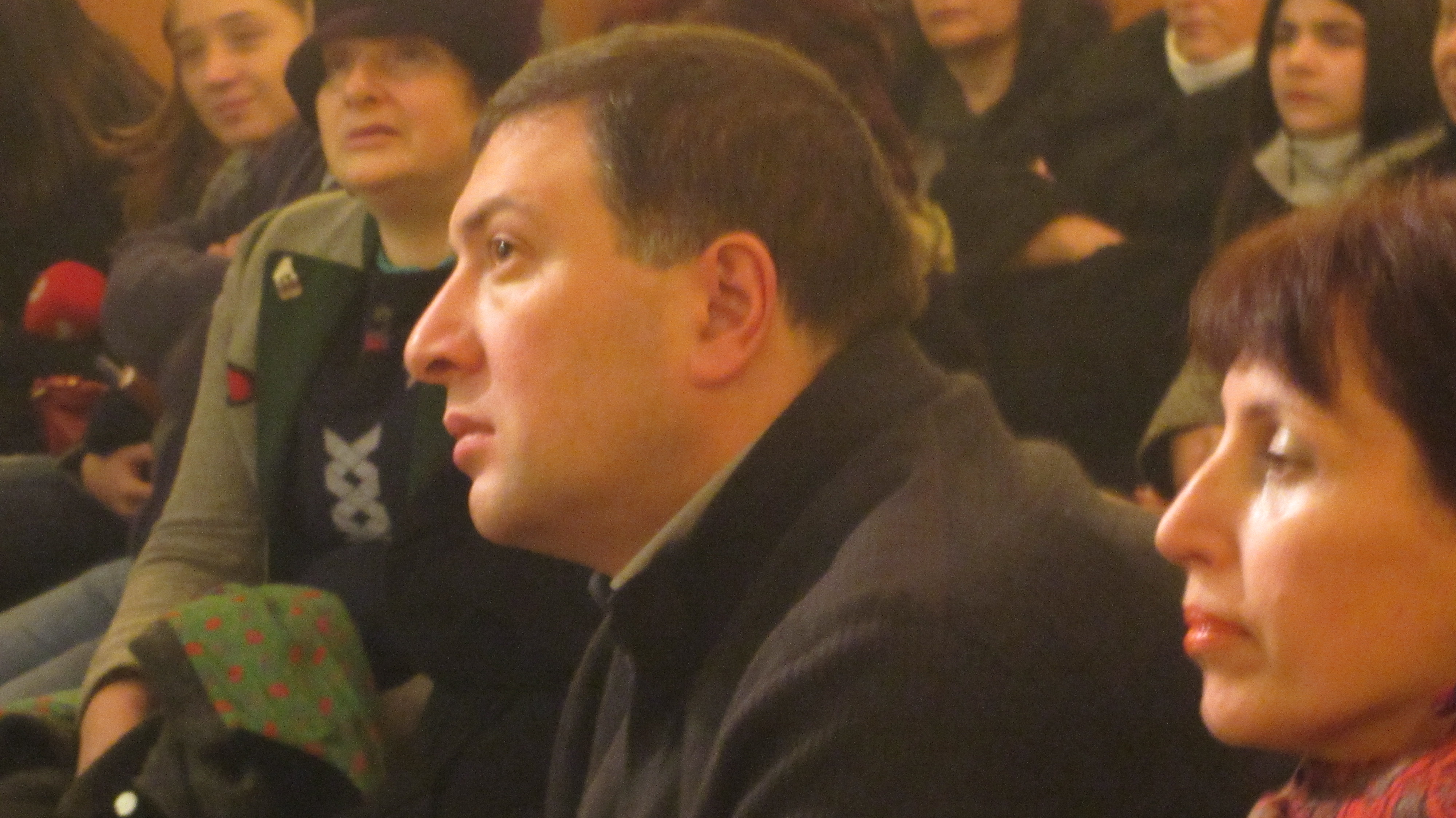 გიგი უგულავა ესწრება შობის აღნიშვნას კათოლიკურ ეკლესიაში